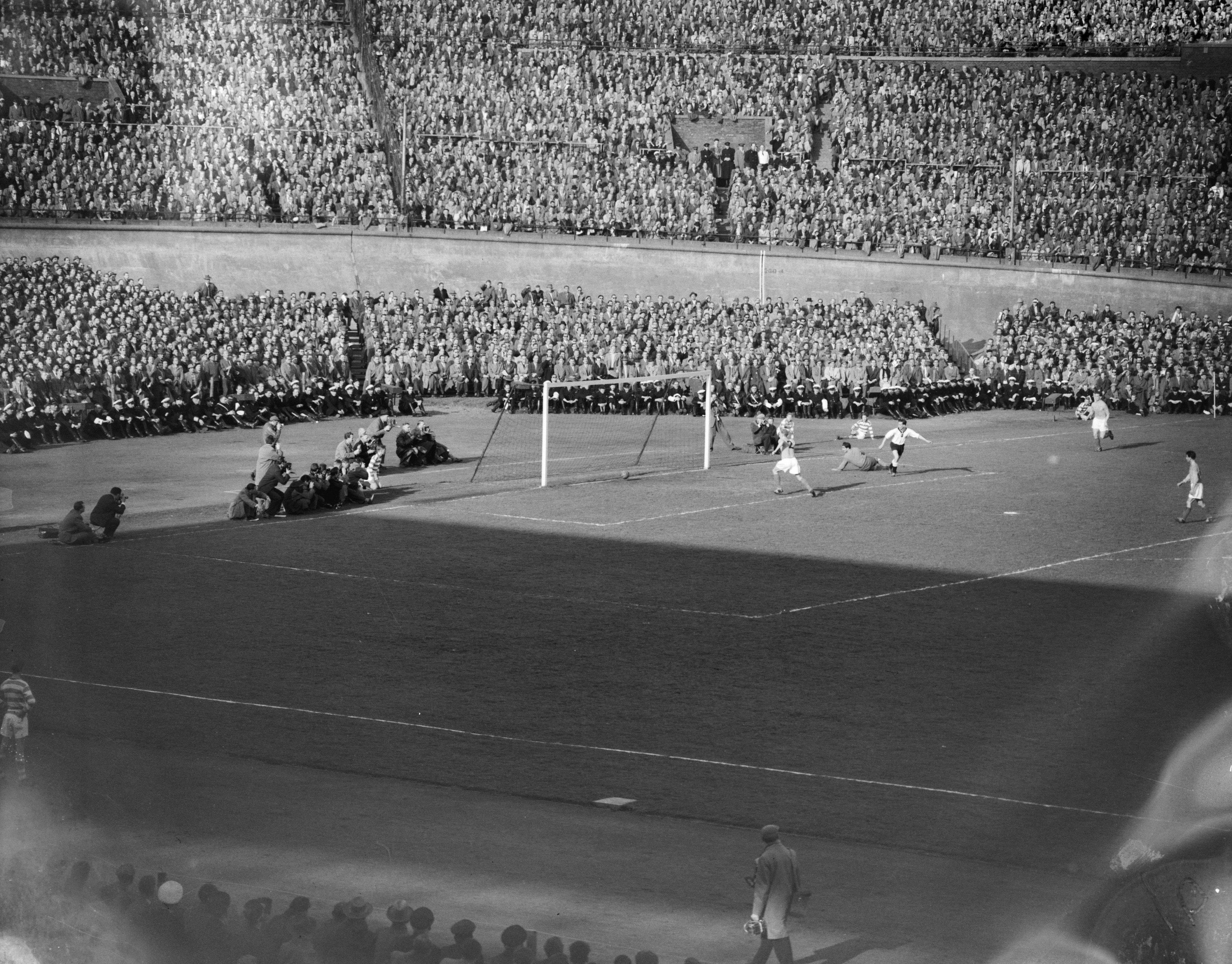 Collectie / Archief : Fotocollectie Anefo Reportage / Serie : [ onbekend ] Beschrijving : Voetbal Nederland tegen Duitsland in Olympisch Stadion Amsterdam. Eerste Duitse doelpunt Datum : 3 april 1957 Locatie : Amsterdam, Noord-Holland Trefwoorden : doelpunten, sport, voetbal Instellingsnaam : Olympisch Stadion Fotograaf : Bilsen, Joop van / Anefo Auteursrechthebbende : Nationaal Archief Materiaalsoort : Negatief (zwart/wit) Nummer archiefinventaris : bekijk toegang 2.24.01.04 Bestanddeelnummer : 908-4684